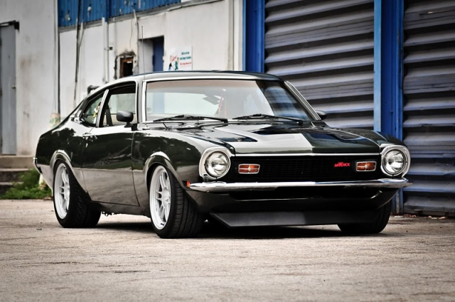 ford maverick